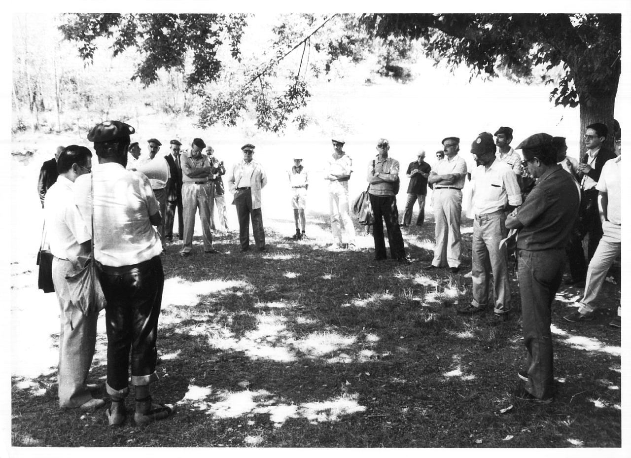 Carlistes al santuari del Collell. Sant Miquel de Campmajor